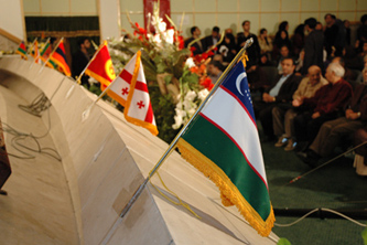 چهارمين جشنواره بين المللي فيلم كوتاه وارش